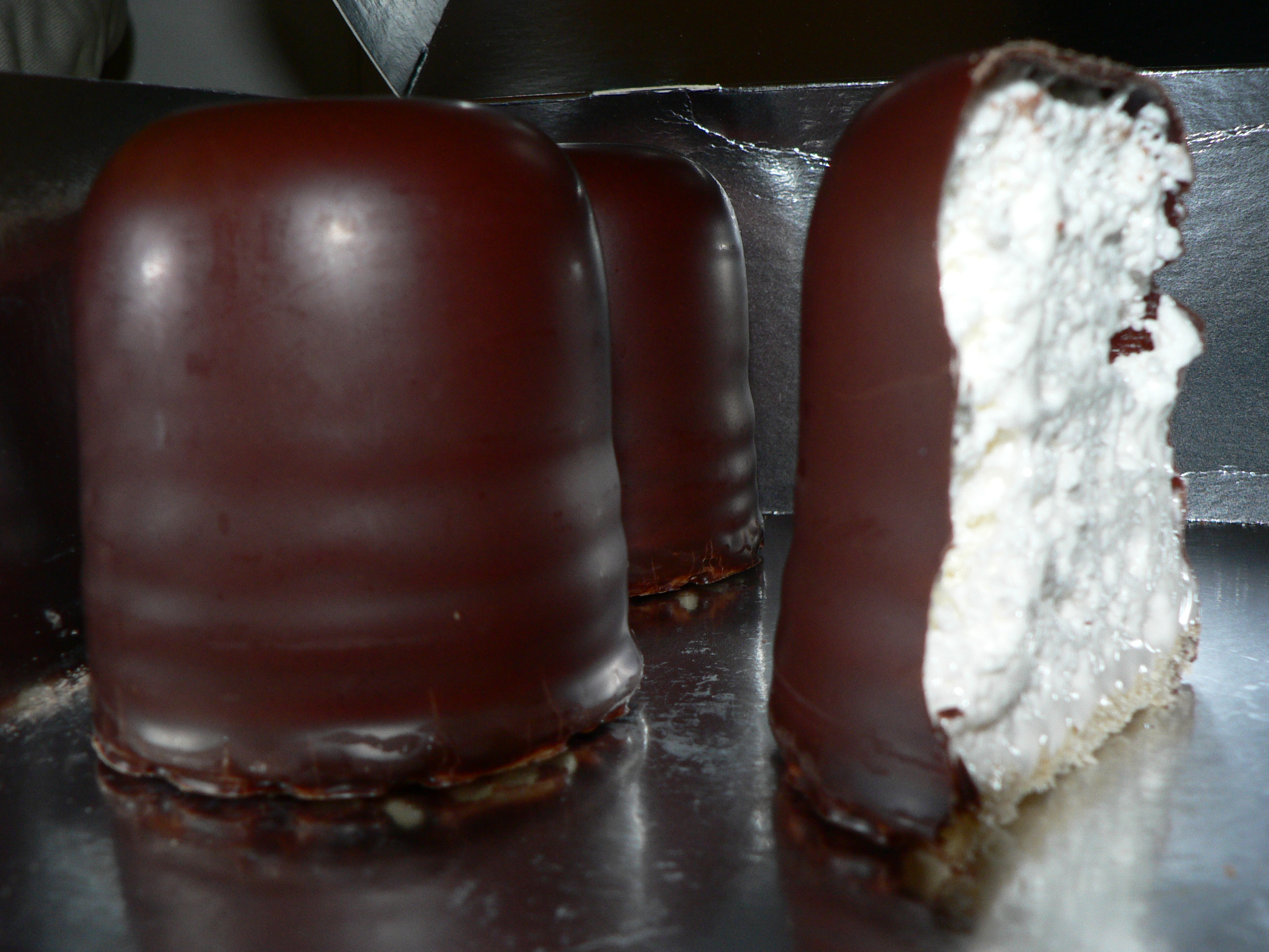 melocakes